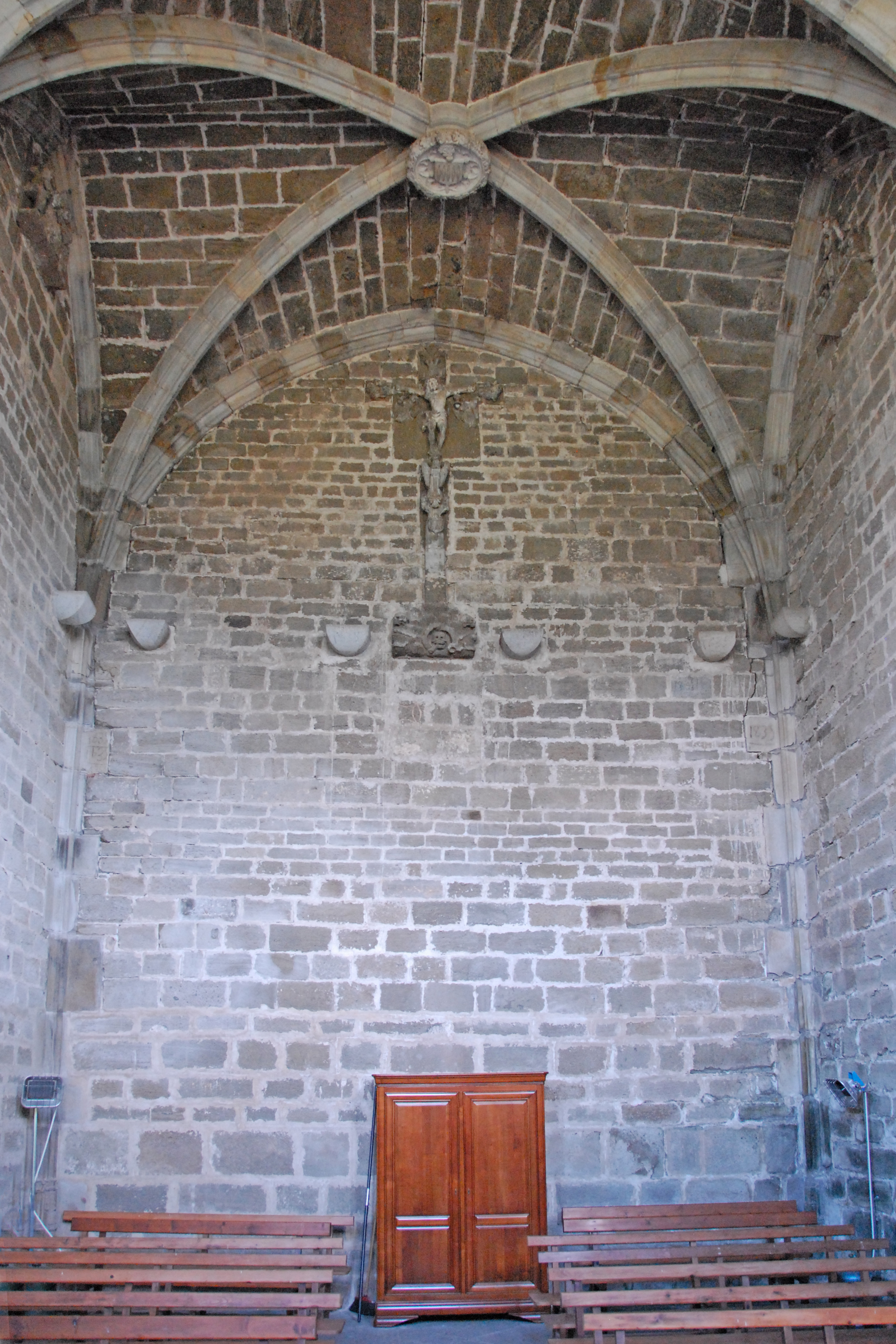 Chanteuges, Chapelle St.-Anne,Westwand, Kreuzrippengewölbe Joch 1